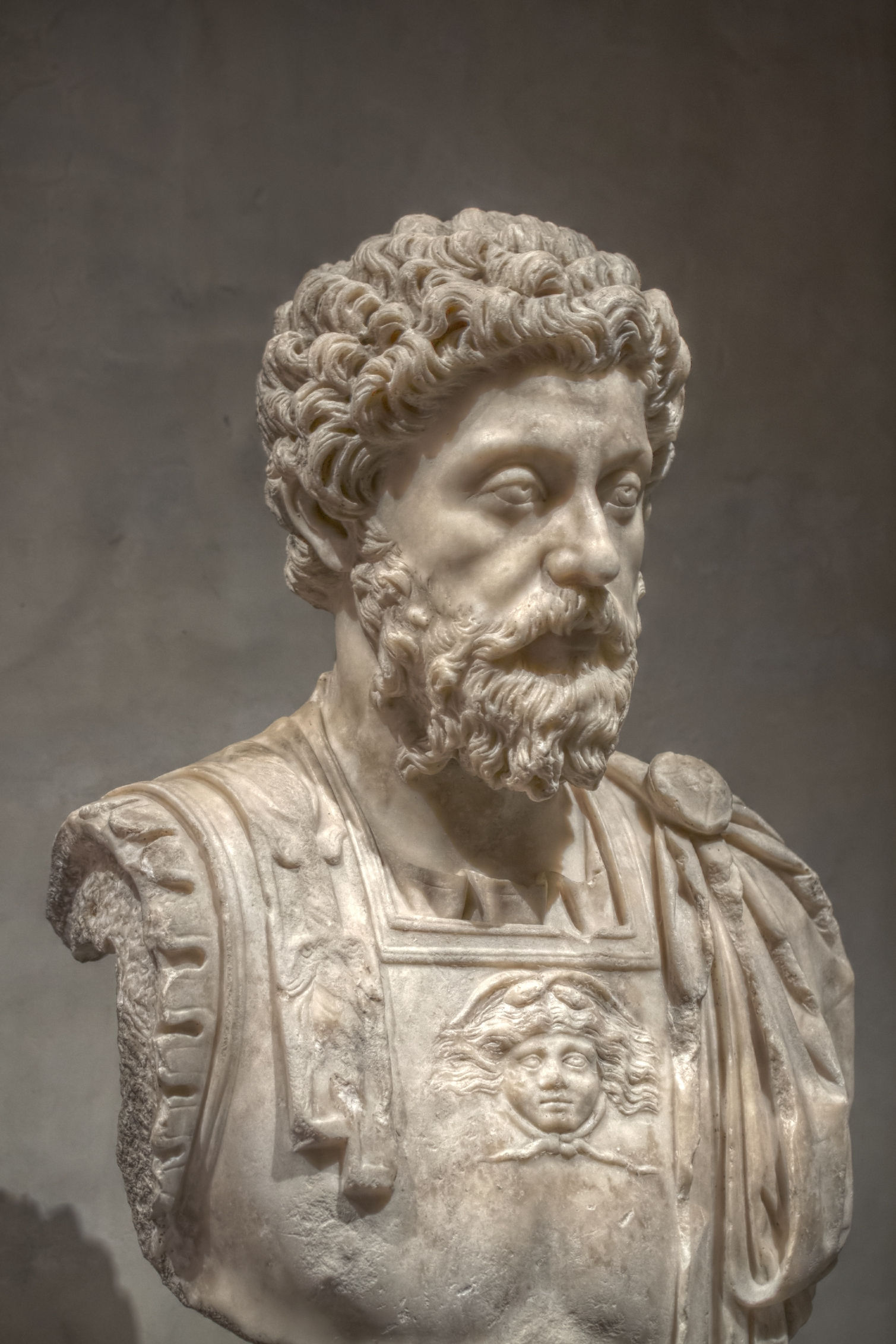 Photograph taken at: L'Image et le Pouvoir : le siècle des Antonins, Musée Saint-Raymond, 19 November 2011–18 March 2012 .